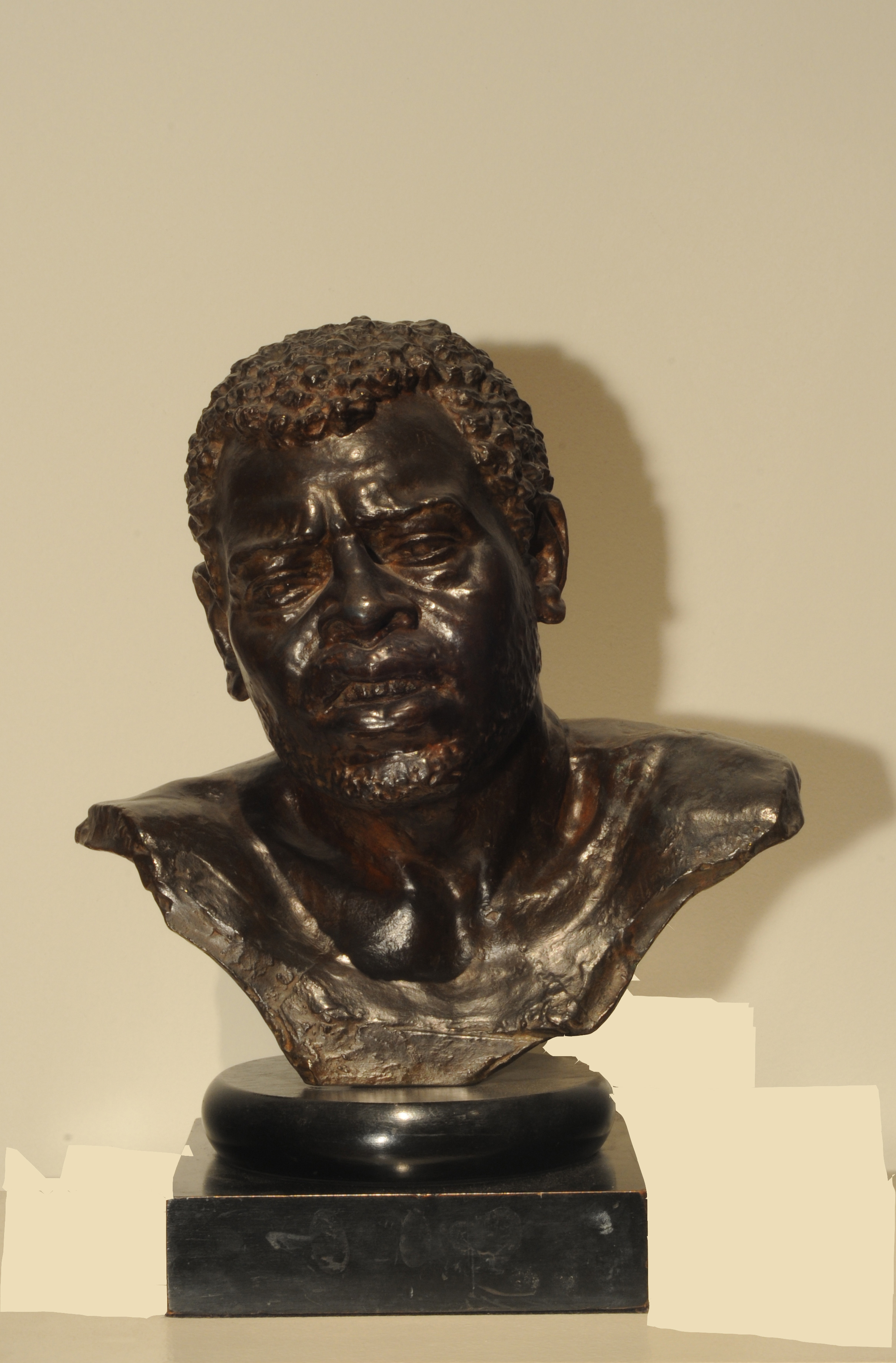 Francisco Cafferata, Busto de esclavo. Ca. 1882. 37 x 37 x 25,5 cm, modelado y vaciado de bronce. Inv. 3629.